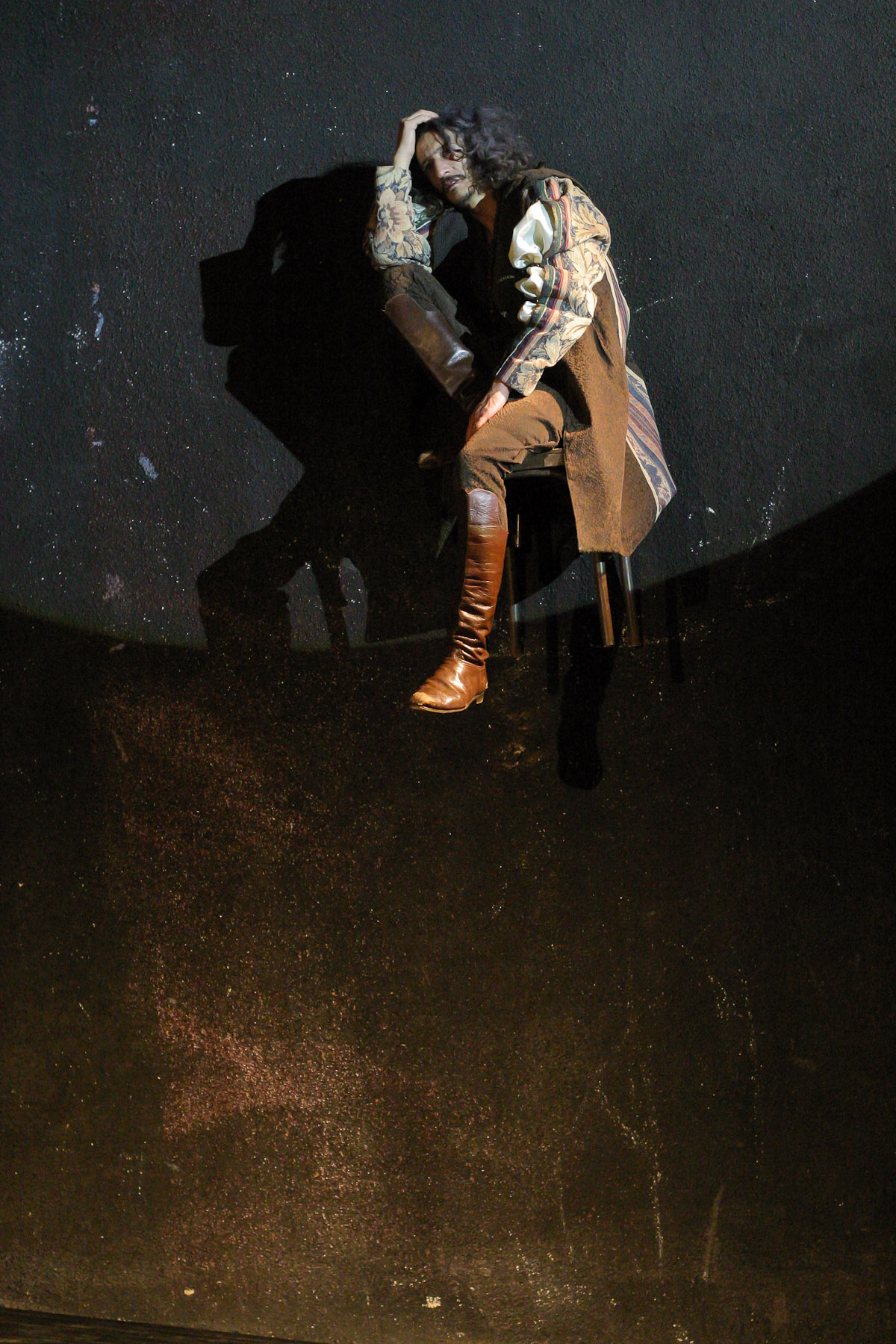 Pálffy Tibor az Othello, a velencei mór címszerepében. Sepsiszentgyörgy.